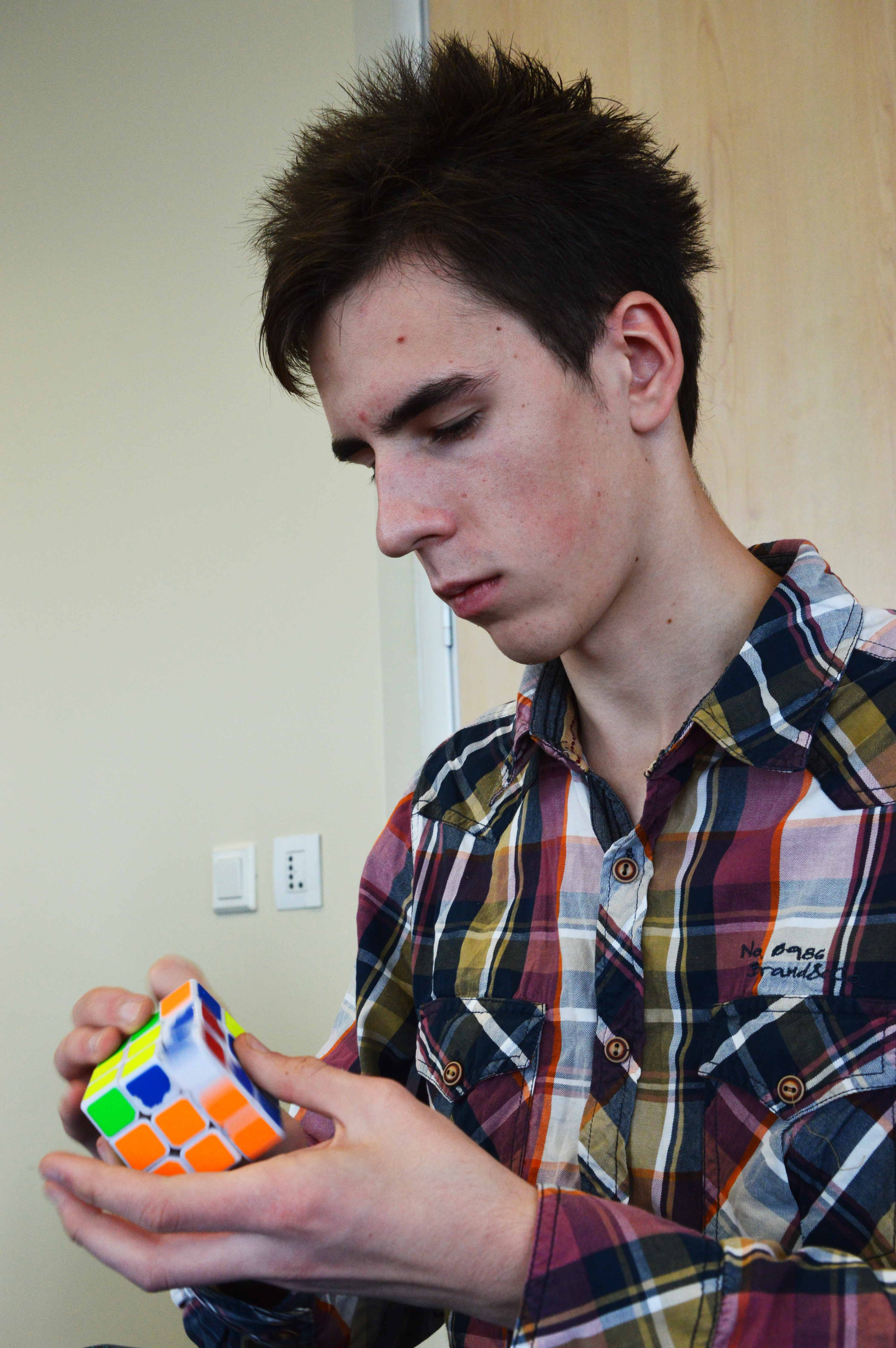 Rubiku kuubiku lahendmine. Mantas Sidabras Leedust. Estonian Open 2013.